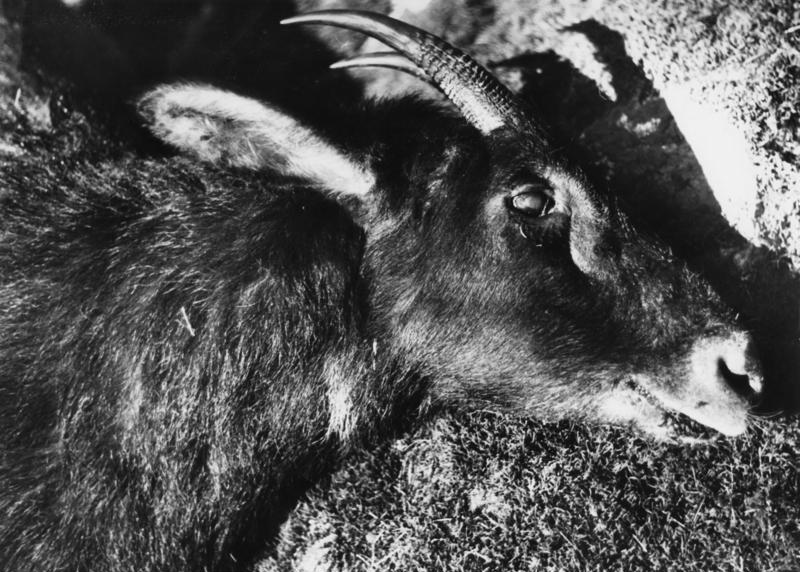 Lachung, Serau